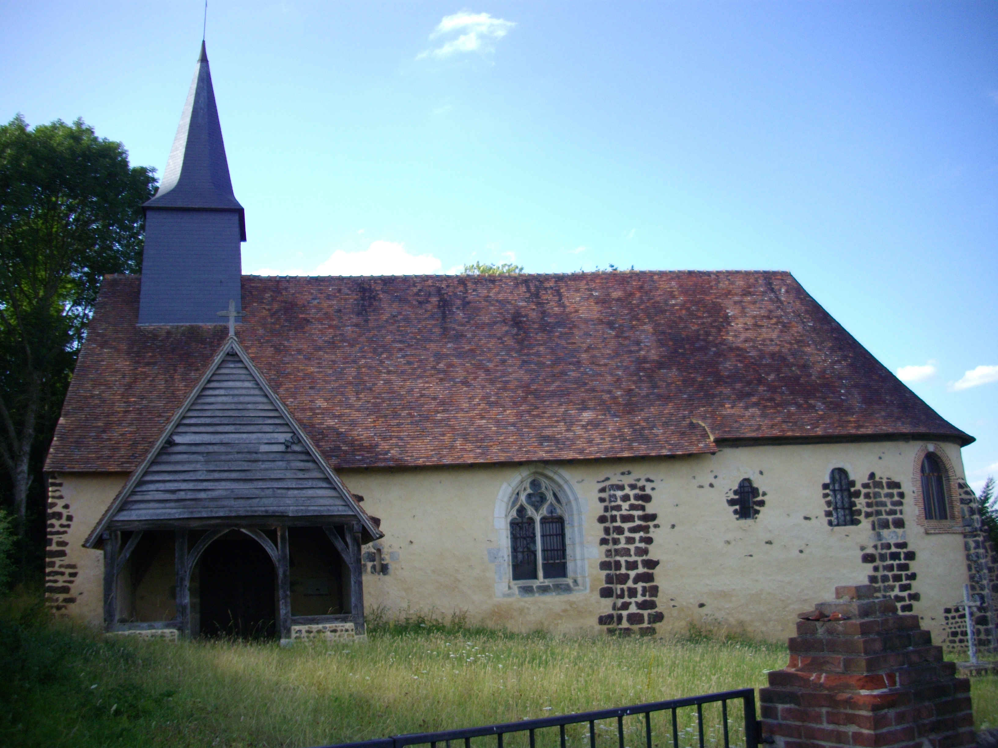 Chapelle Saint-Denis-d'Herponcey, 12e - 13e siècle, inscrite sur l'inventaire supplémentaire des monuments historiques par arrêté du 1er octobre 1990